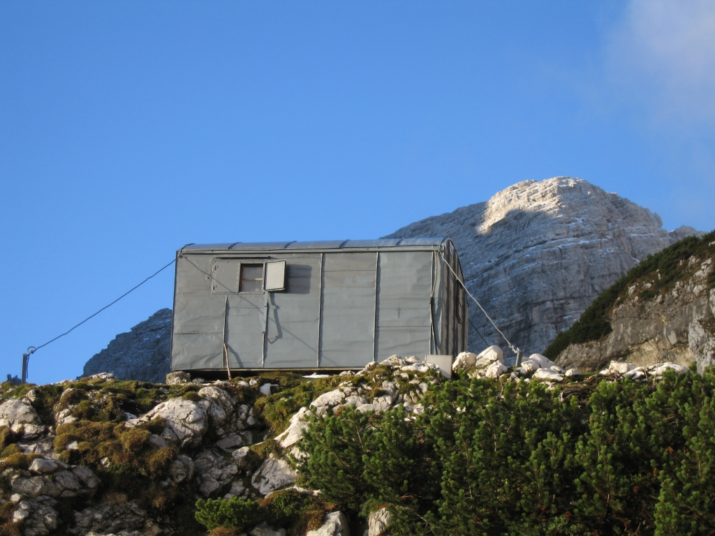 Bivak IV na Rušju